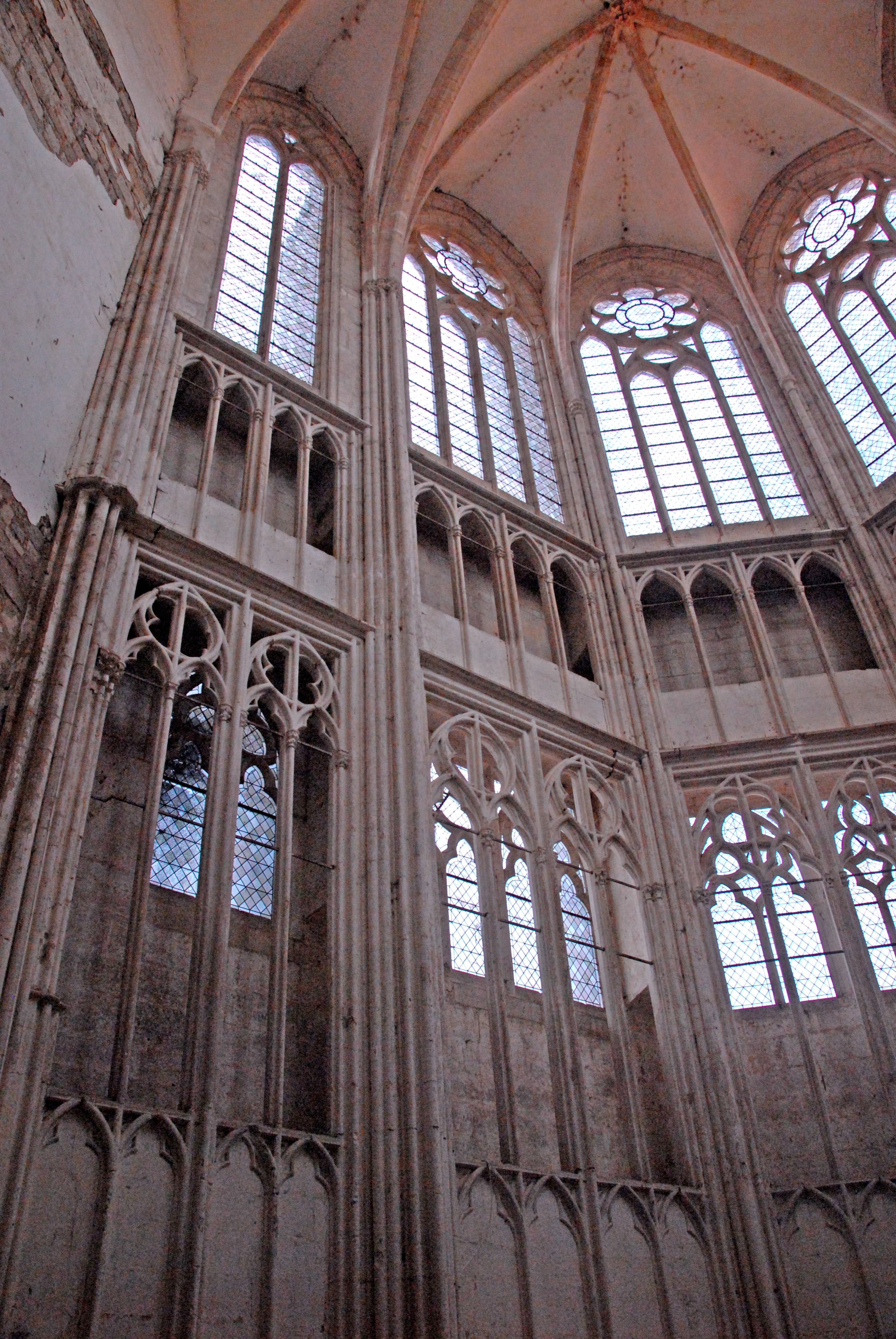 St-Thibault de Saint-Thibault, Chor, Nordostseite